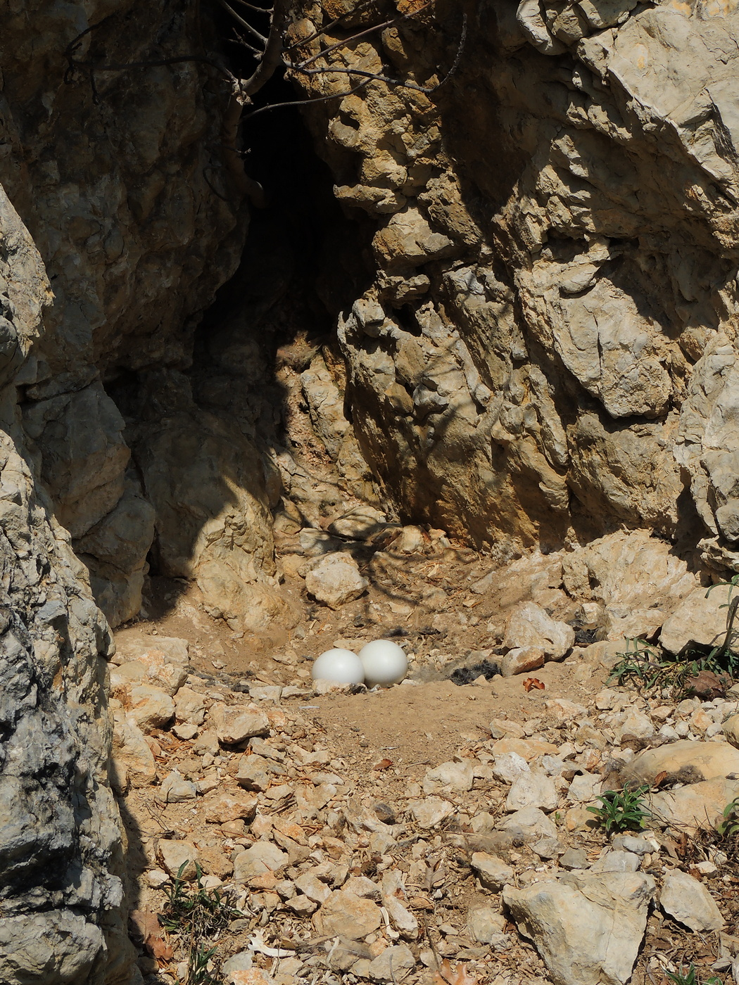 Srpski naziv buljina Opis vrste D.t. 59-73 cm. Rasprostranjena je na većem delu evropskog kontinenta (osim ravničarskih delova centralne i zapadne Evrope i delova Skandinavskog poluostrva), u maloj Aziji, na Bliskom Istoku i u vrlo širokom području umerene i centralne Azije do obala Tihog okeana. Stanarica je. Naseljava veoma različita staništa, koja joj pružaju mogućnosti za gnežđenje i ishranu: klisure, kanjone, planinska područja, stepe i polupustinje, šume, morske obale i dr. Gnezdi se u zaklonima u stenama, na tlu, povremeno na ruševinama strih građevina, lesnim odsecima i dr. Ishrana je vrlo raznovrsna i sastoji se pretežno od sisara i ptica (u Evropi su najzastupljeniji glodari, ježevi, zečevi, vrane, vodene ptice, male i srednje ptice grabljivice, druge vrste sova itd). U Srbiji je redovna gnezdarica čija je populacija procenjena na 300 - 400 gnezdećih parova. Većina populacije se gnezdi u klisurama, kanjonima i kamenjarima brdsko-planinskog dela zemlje. Status zaštite vrste IUCN crvena lista - Kategorija LC; Direktiva o pticama EU - Annex I; Ptice od posebnog značaja za zaštitu u Evropi: SPEC 3; Konvencija o očuvanju evropske divlje flore i faune i prirodnih staništa - Annex I; Pravilnik o proglašenju i zaštiti strogo zaštićenih i zaštićenih divljih vrsta biljaka, životinja i gljiva: Prilog I Strogo zaštićene divlje vrste biljaka, životinja i gljiva